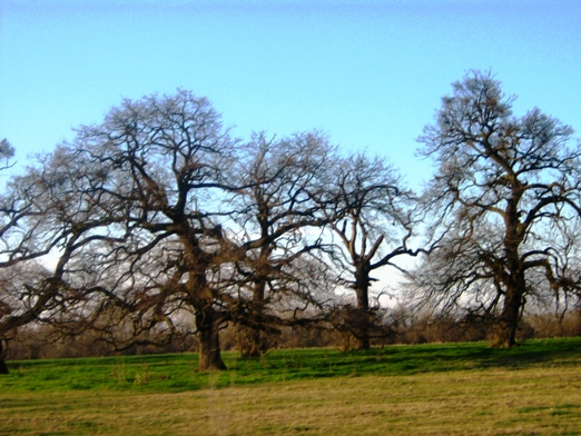 Bogyiszlói őstölgyes